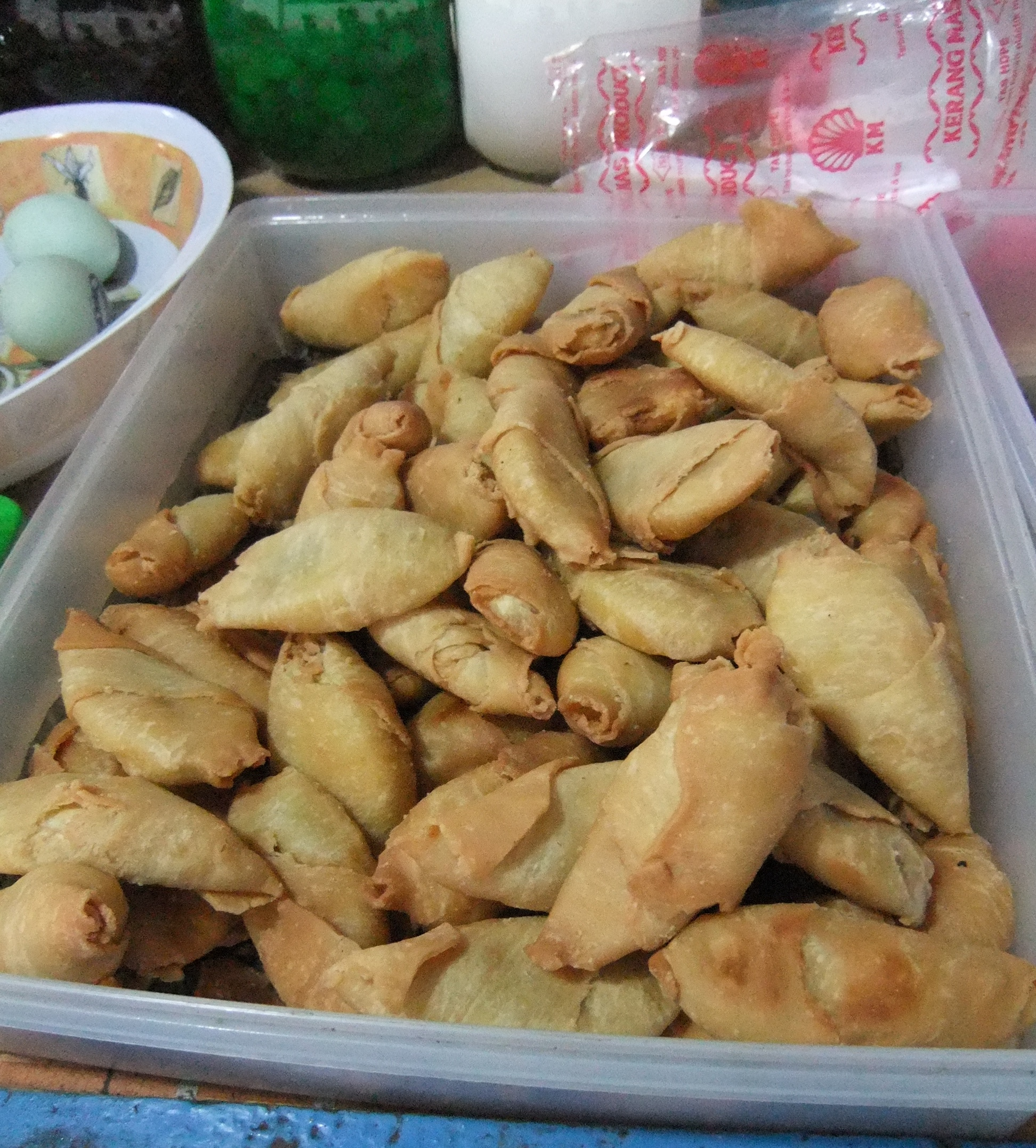 Pisang molen